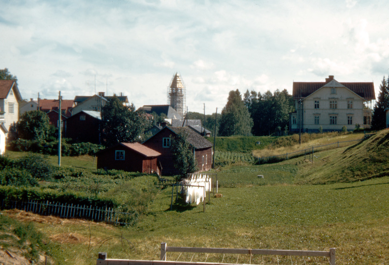 Bjurträsk 1949